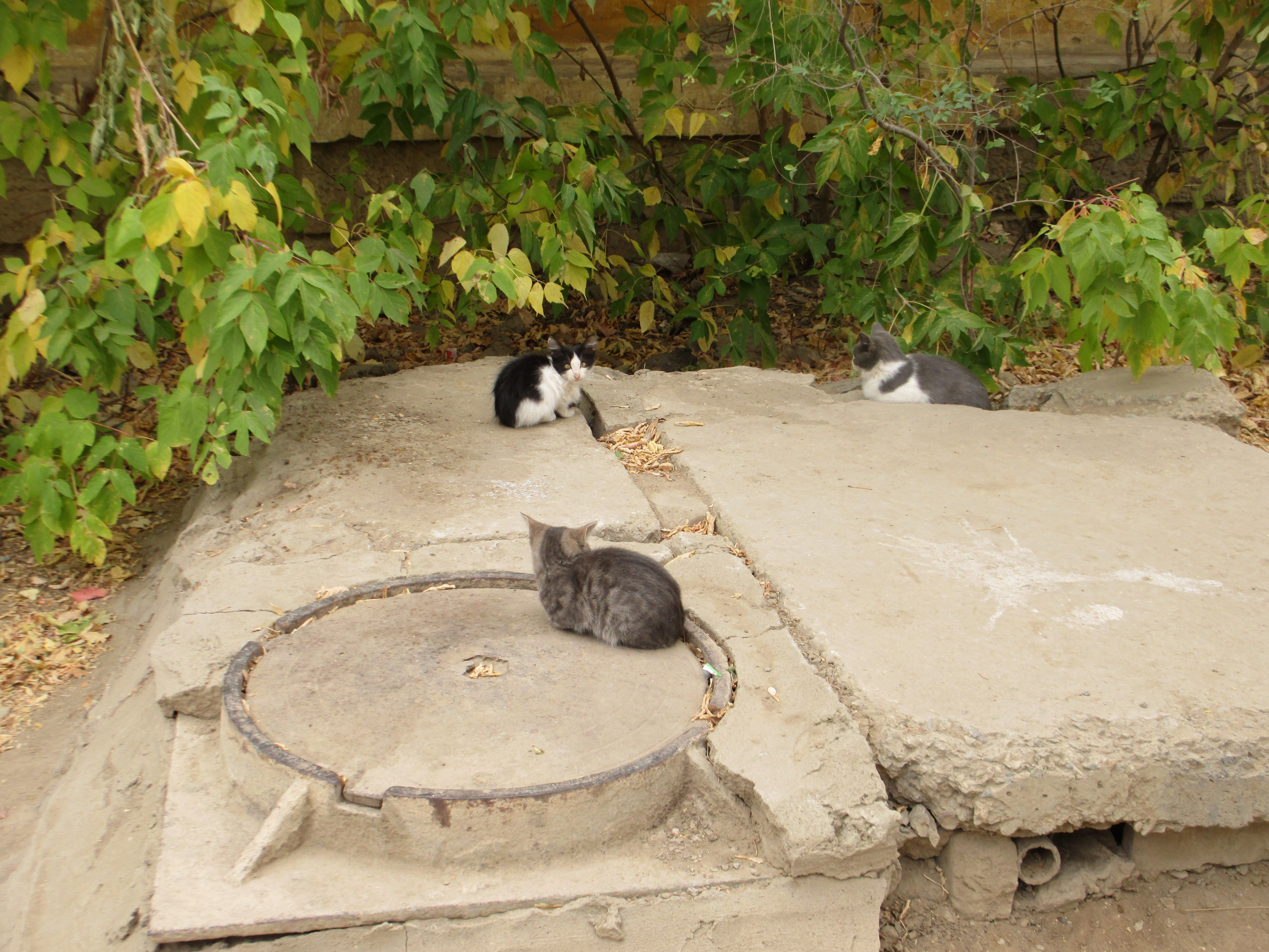 Бездомные кошки на улице (Актобе, Казахстан).